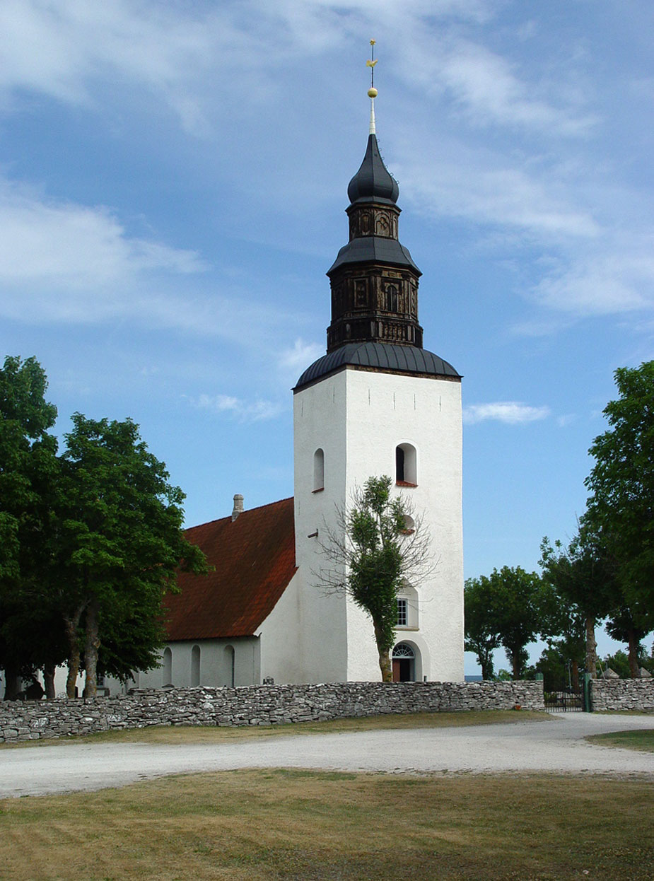 Fårö-Kirche auf Fårö (Gotland). Die Kirche aus dem Mittelalter wurde durch Umbauten im 18./19.Jh stark verändert